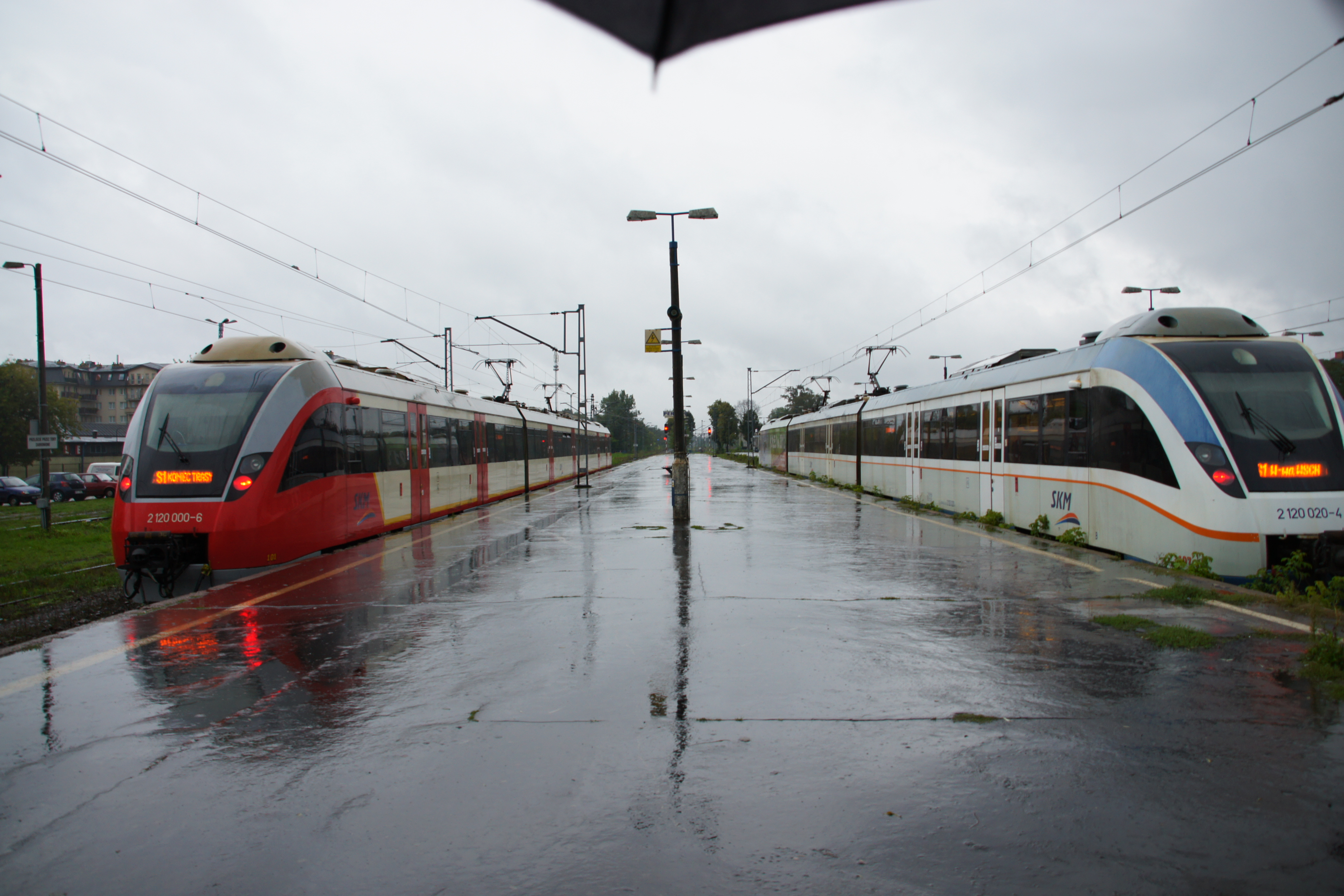 2 składy SKM na stacji w Otwocku